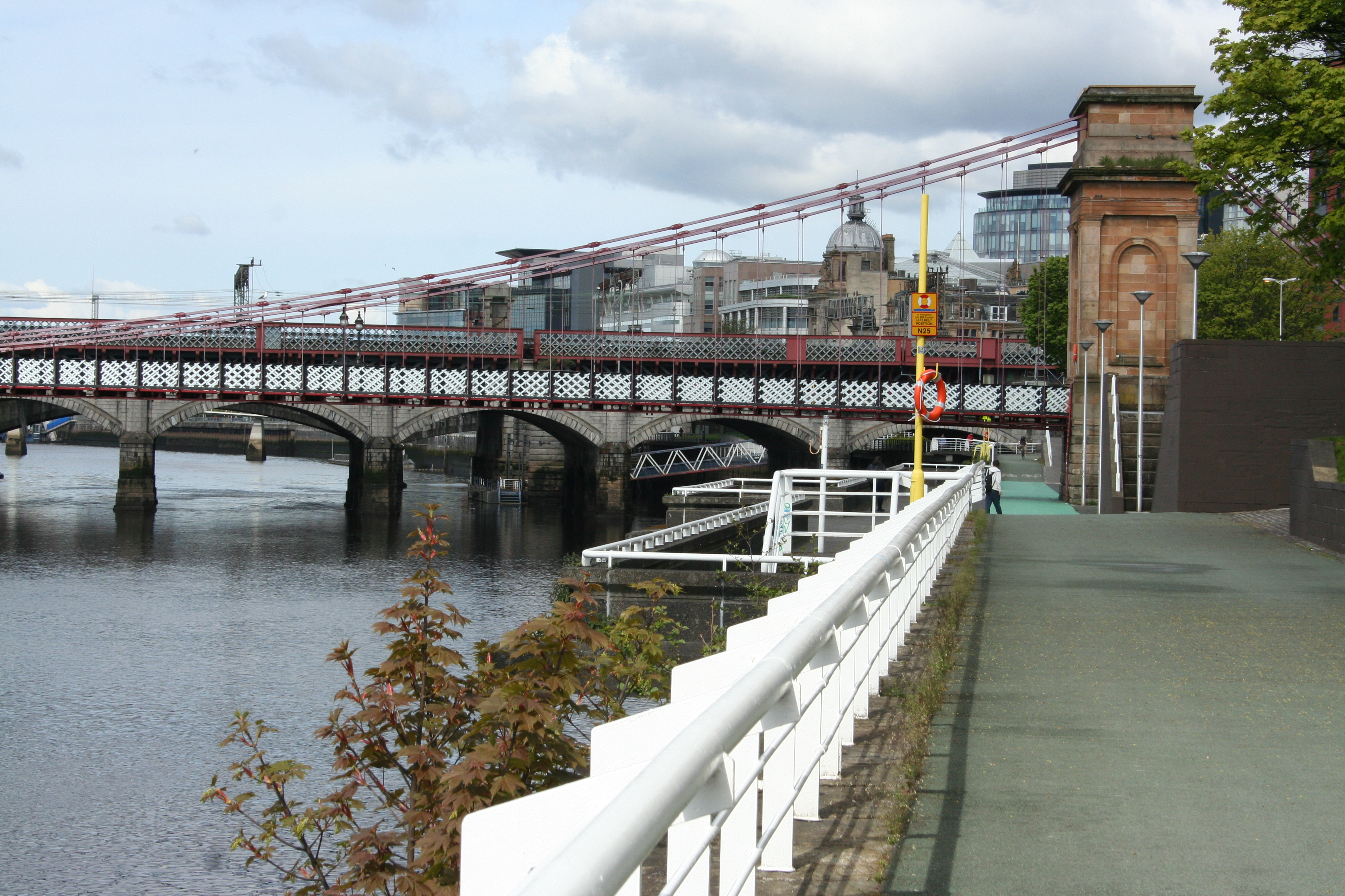 Die 1851 erbaute und 1871 wiederrichtete “South Portland Street Suspension Footbridge” über den River Clyde in Glasgow (Upper Harbour, Mehr Informationen) vom Architekten A Kirkland und dem Ingenieur George Martin. Dahinter die 1894-1899 vom Ingenieur Thomas Telford erbaute Glasgow Bridge (Upper Harbour, Mehr Informationen).